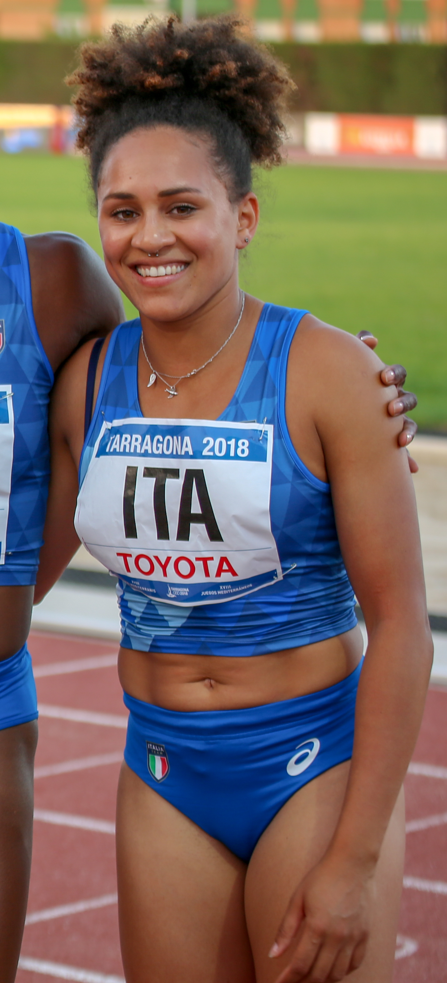 Johanelis Herrera Abreu en los relevos 4x100 en los Juegos del Mediterráneo 2018